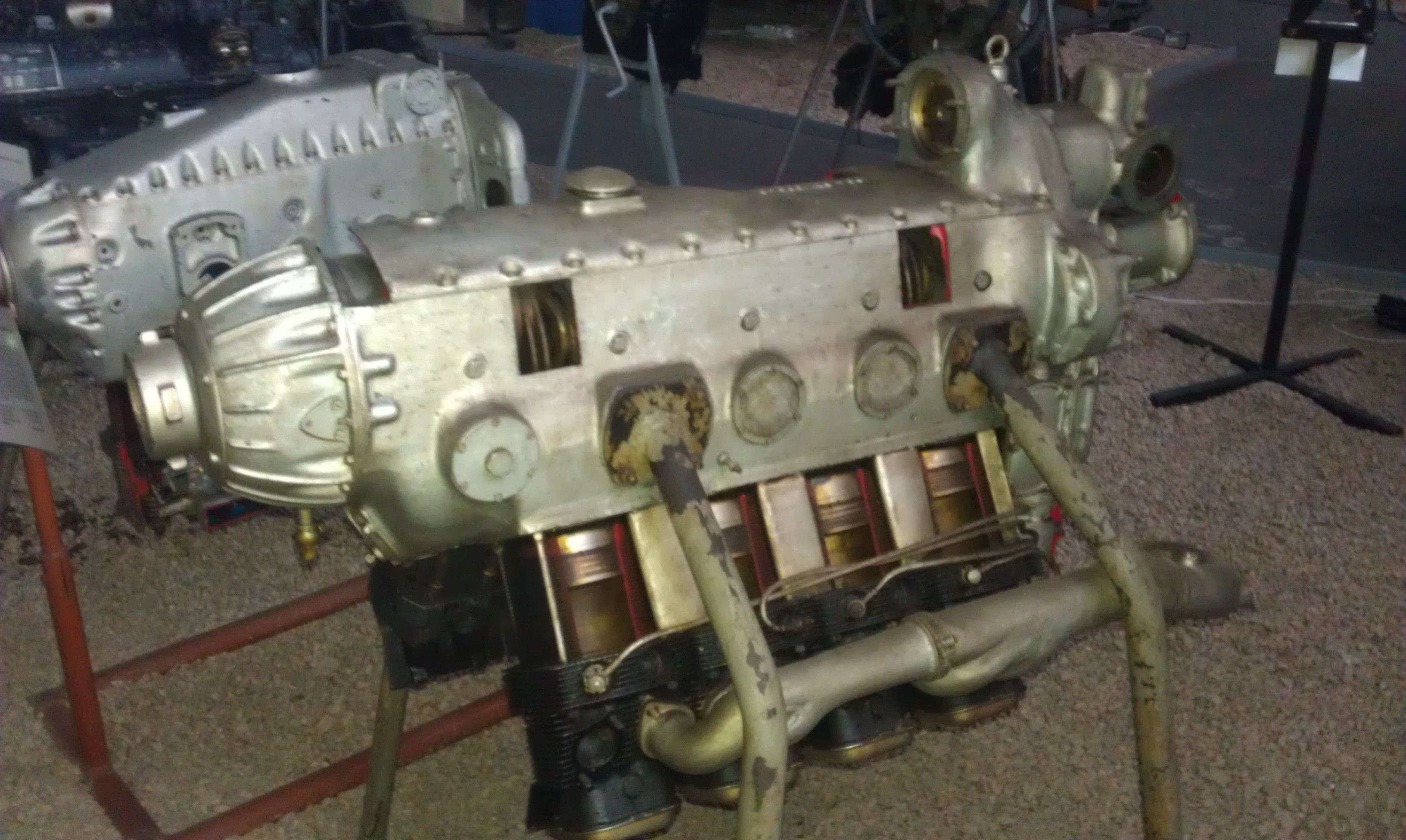 Fotografie eines Schnittmodells eines Hirth HM 508 / Fotography of a Hirth HM 508